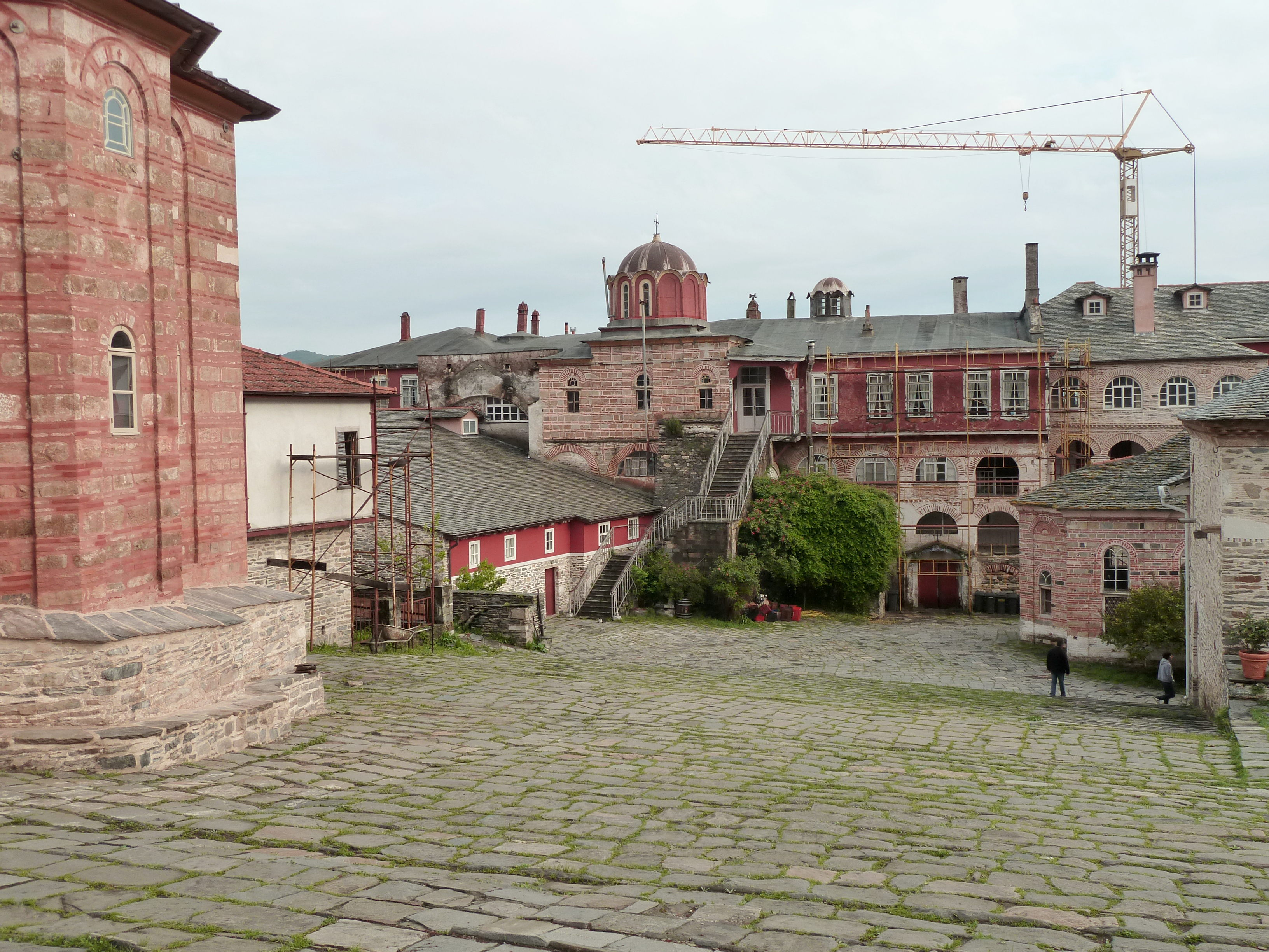 Cour intérieure du monastère de Vatopedi (Mont Athos)